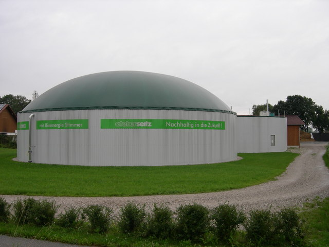 Biogasanlage bei Niederneuching